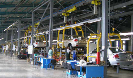 Ильичёвский завод автомобильных агрегатов. Конвейер сборки автомобилей.